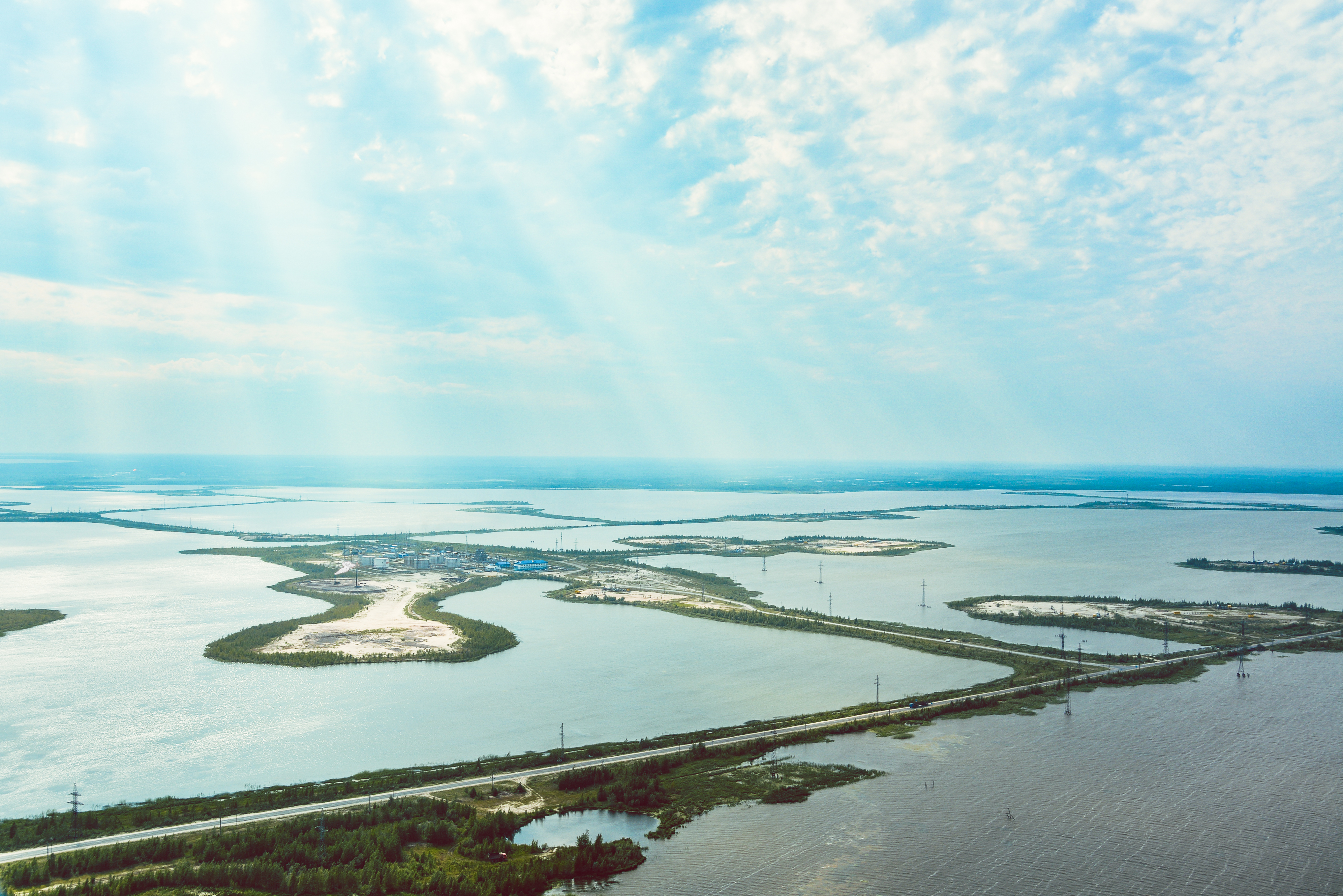 Фото с вертолёта